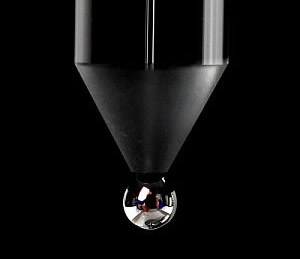 DME